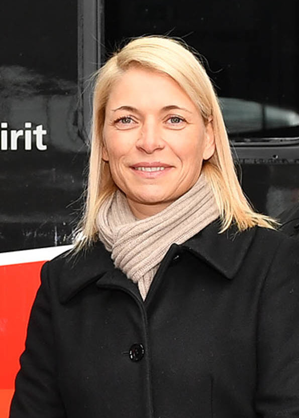 ÖBB-Personenverkehr Chefin Evelyn Palla